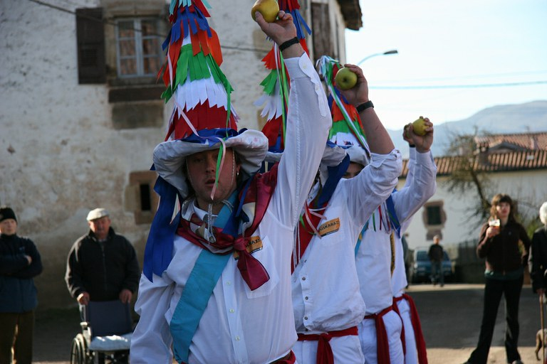 Arizkungo sagardantza, 2008ko inaute-astearte goizean